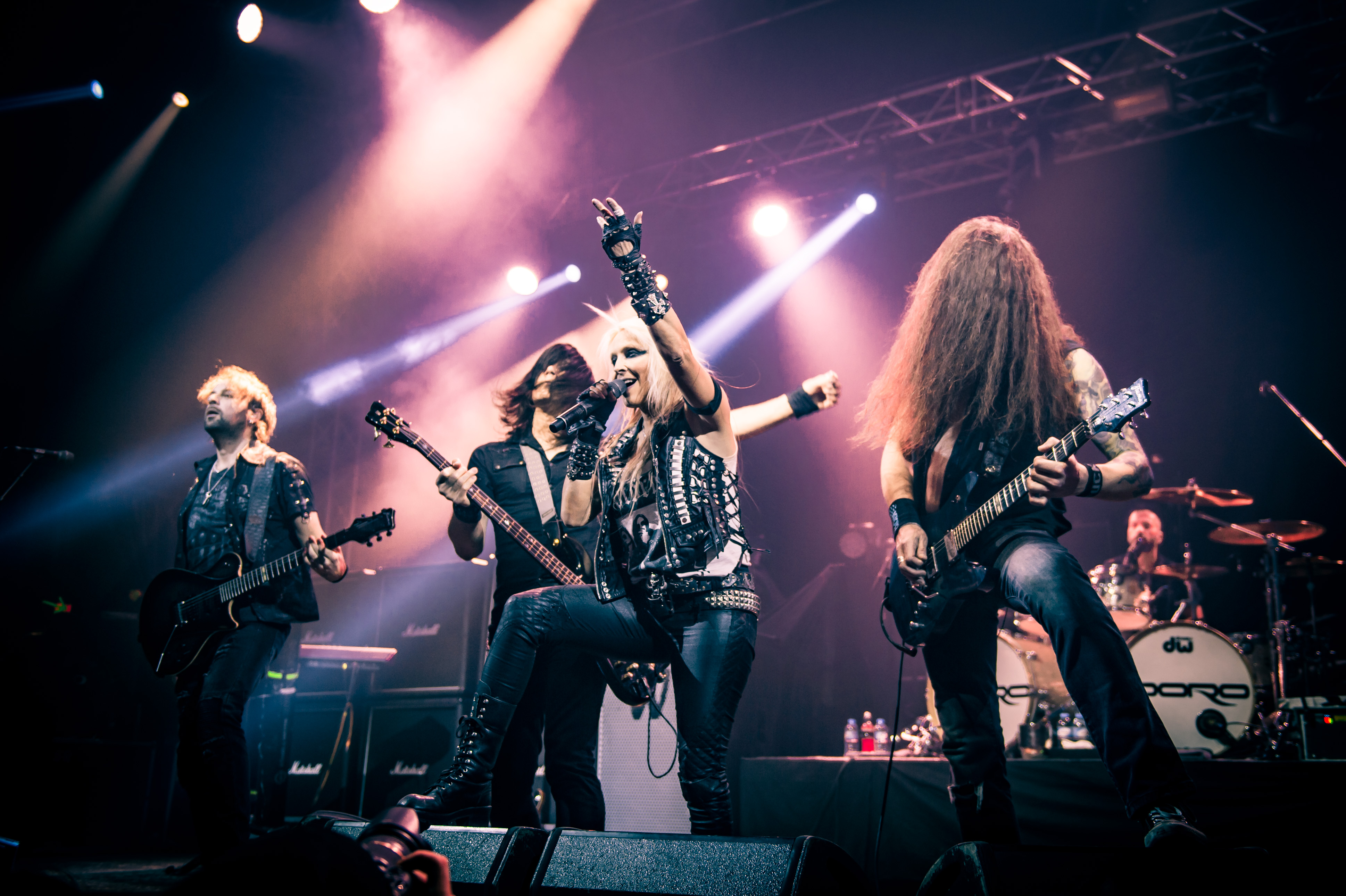 'Ruhrpott Metal Meeting 2017; Turbinenhalle Oberhausen': 'Doro'